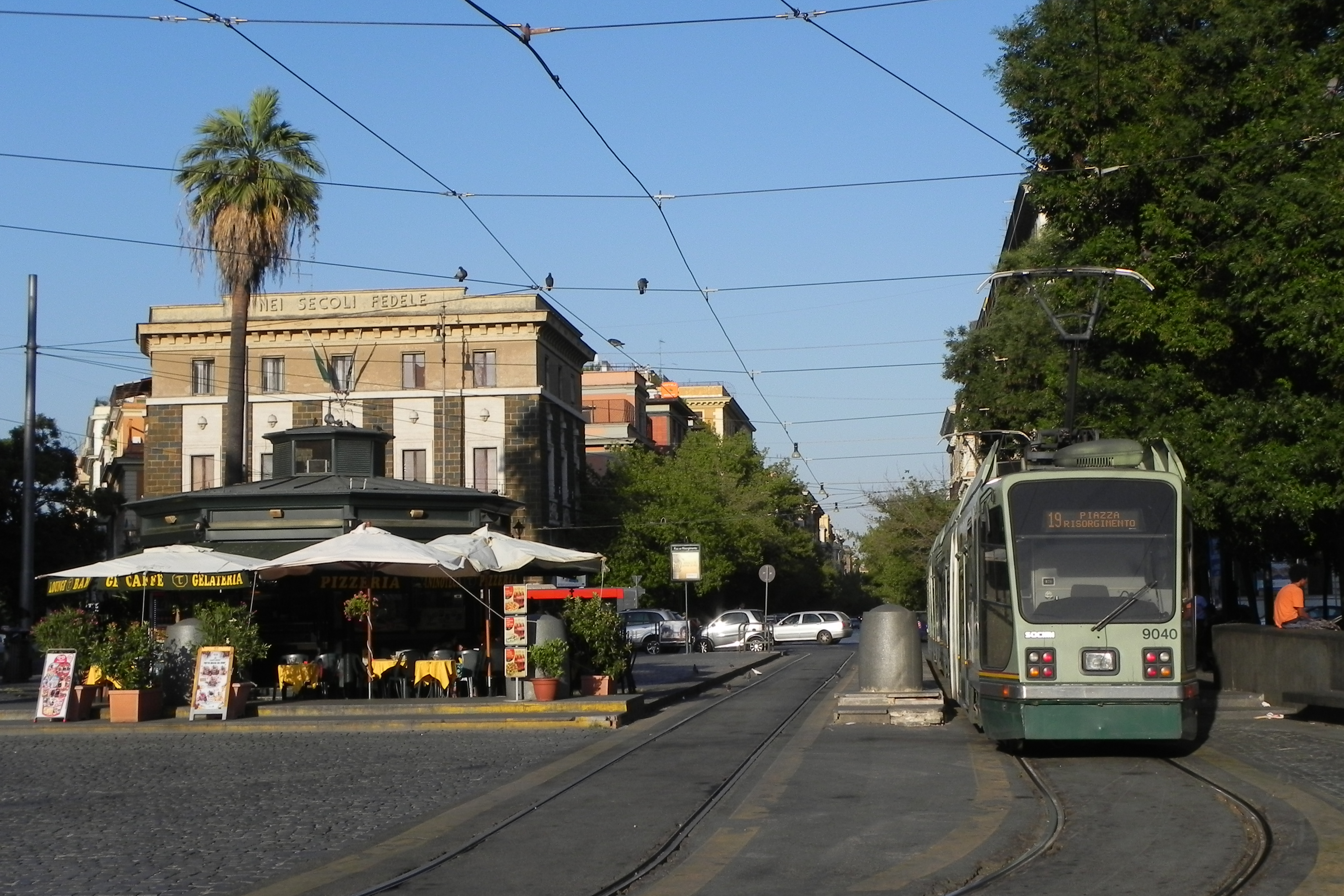 Tram snodato SOCIMI, ATAC n. 9040, al capolinea del 19 in Piazza del Risorgimento a Roma nel 2012.